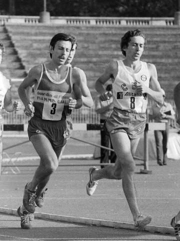 Franco Fava (col n.3) in un meeting italiano negli anni settanta